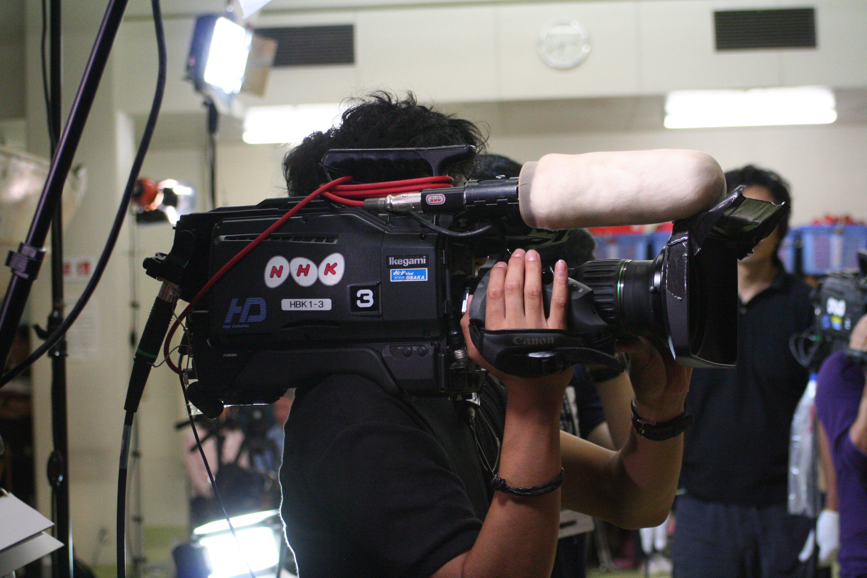 2009年9月29日から10月1日にかけて行なわれたNHK神戸のテレビ実況中継キャラバンによるテレビ収録の様子。キャラバンの司会者は今城和久と久保静。最終中継地である相生市内の相生ペーロン城にて撮影。 3人のガラス工芸を撮影中のテレビカメラマン。